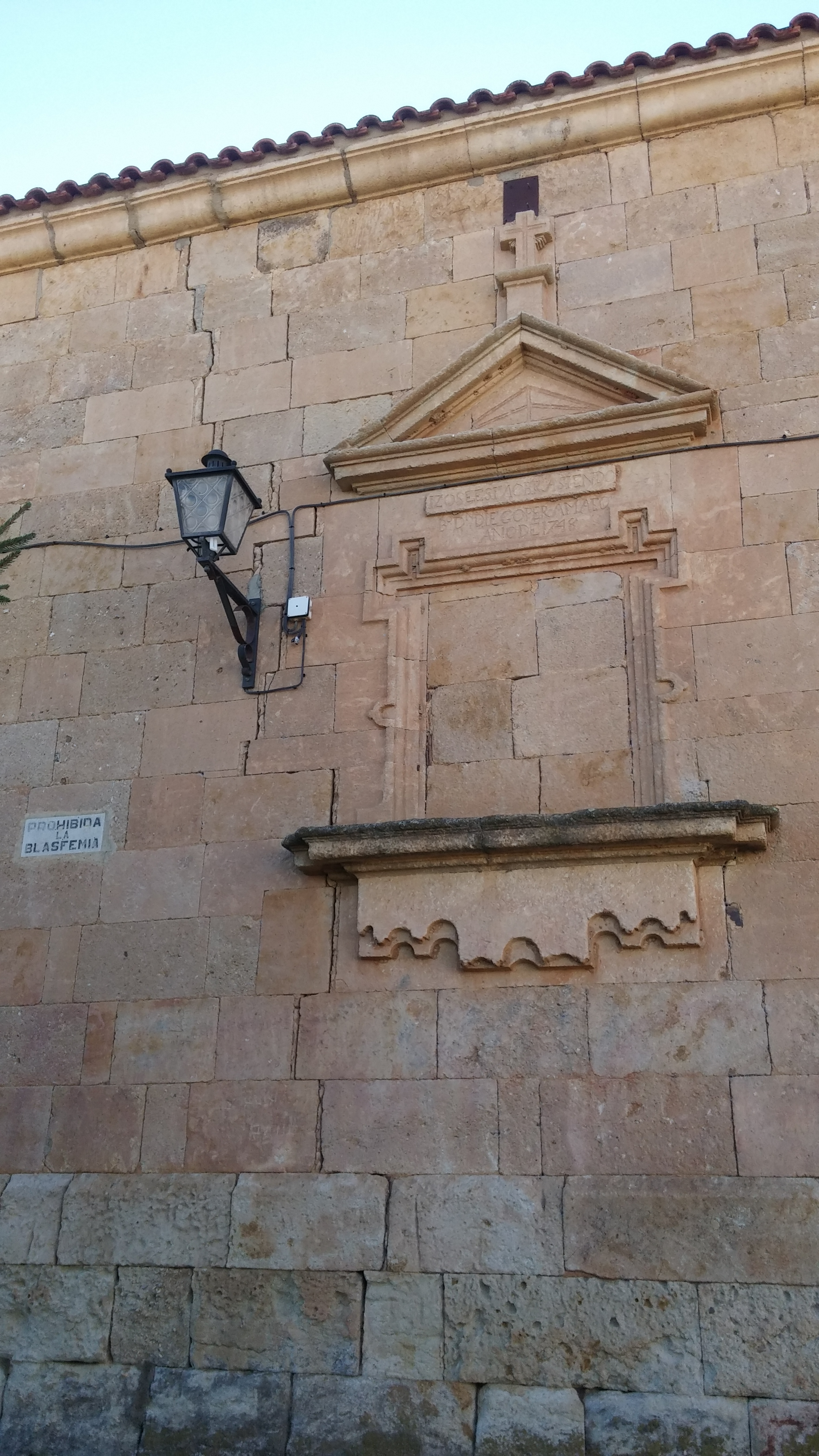 Parte trasera de la iglesia de Golpejas, donde puede observarse la fecha de la erección de la misma (1748)